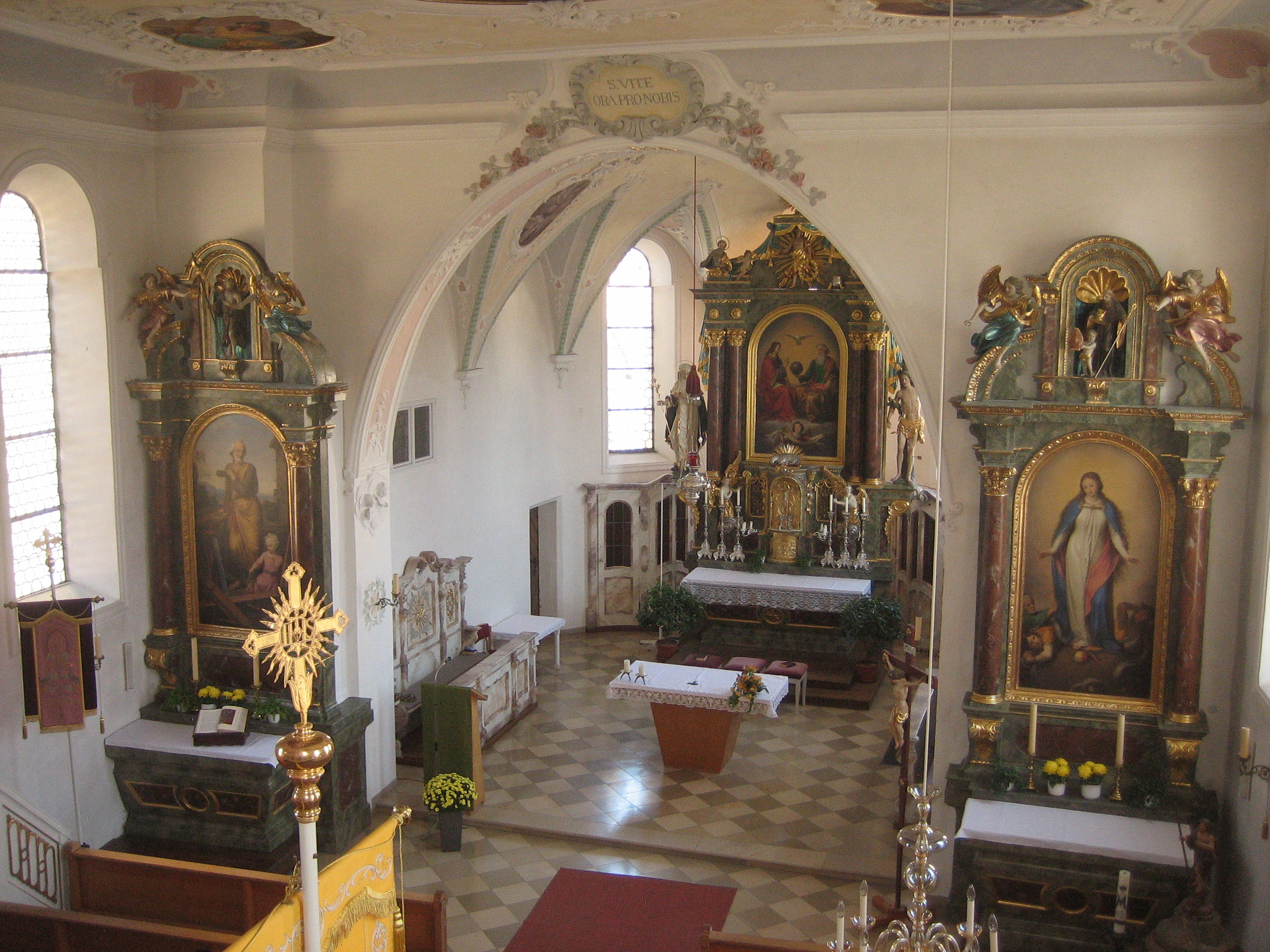 St. Vitus, Modestus und Kreszentia, Wolfertschwenden, Landkreis Unterallgäu, Bayern